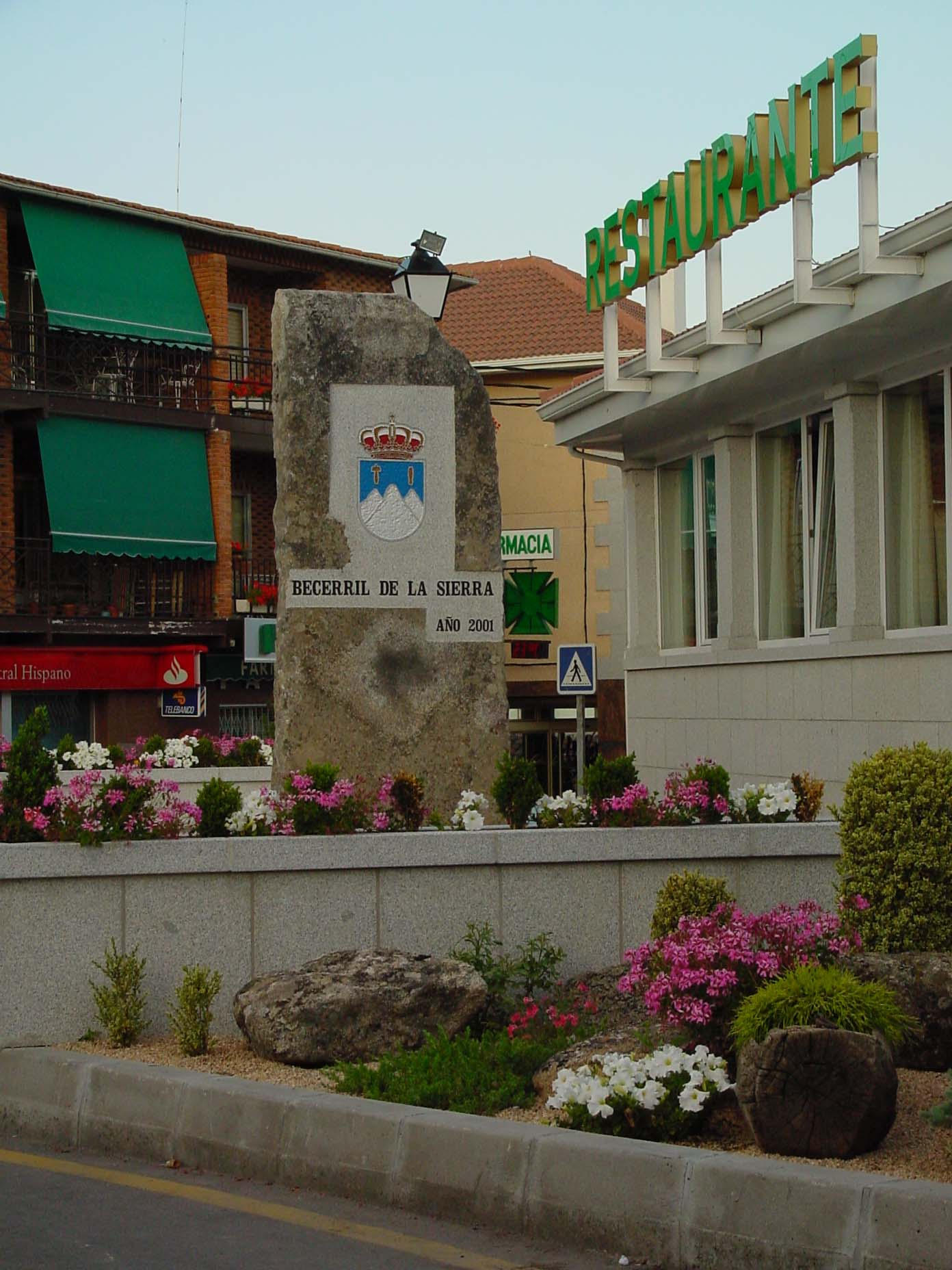 Escudo de Becerril de la Sierra.